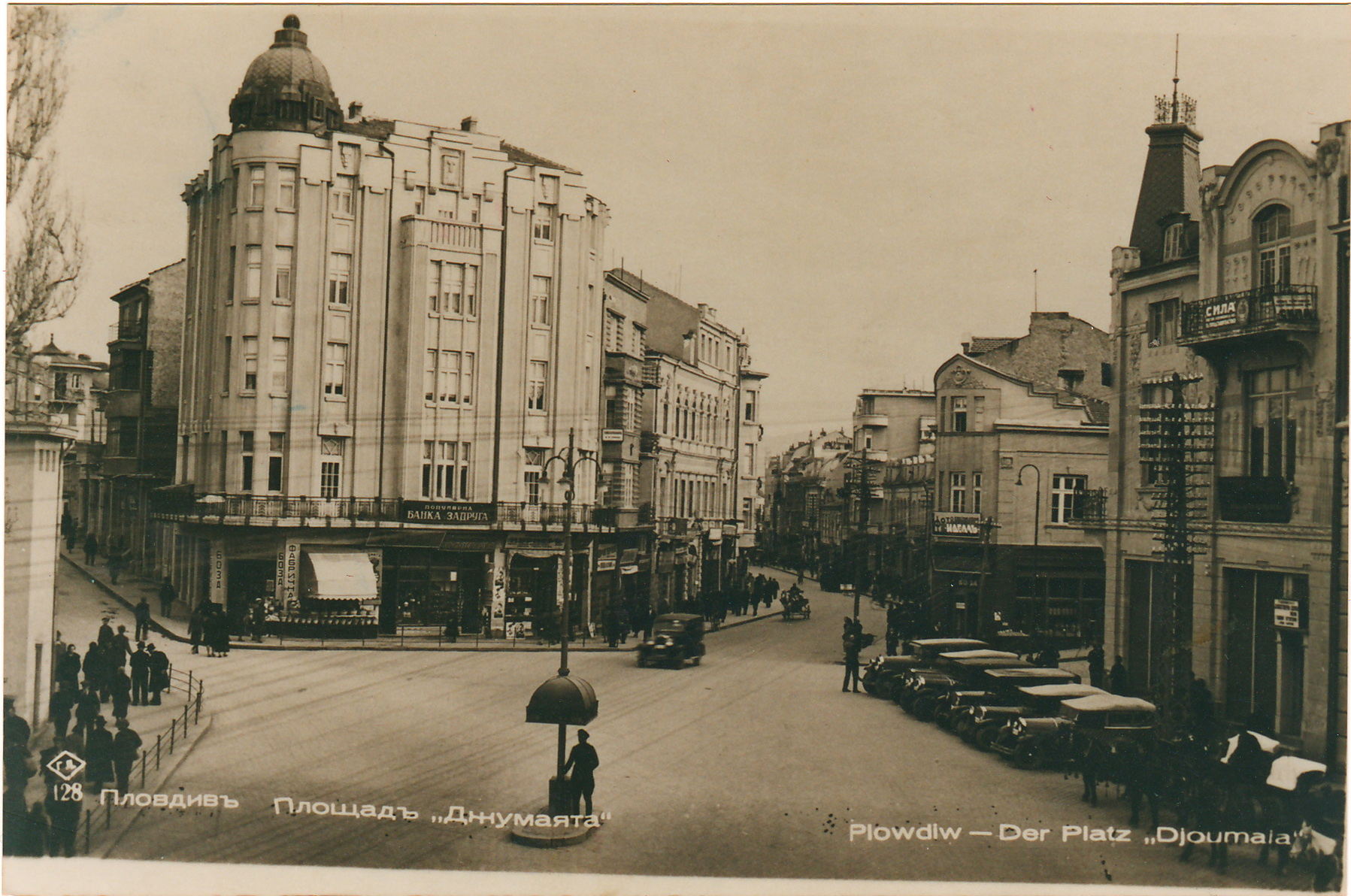 Площад Джумаята, Пловдив, България.